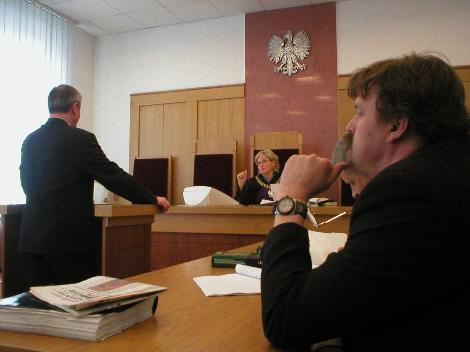 Jerzy Jurecki na ławie oskarżonych w Sądzie Okręgowym w Nowym Sączu w pierwszym dniu procesu.